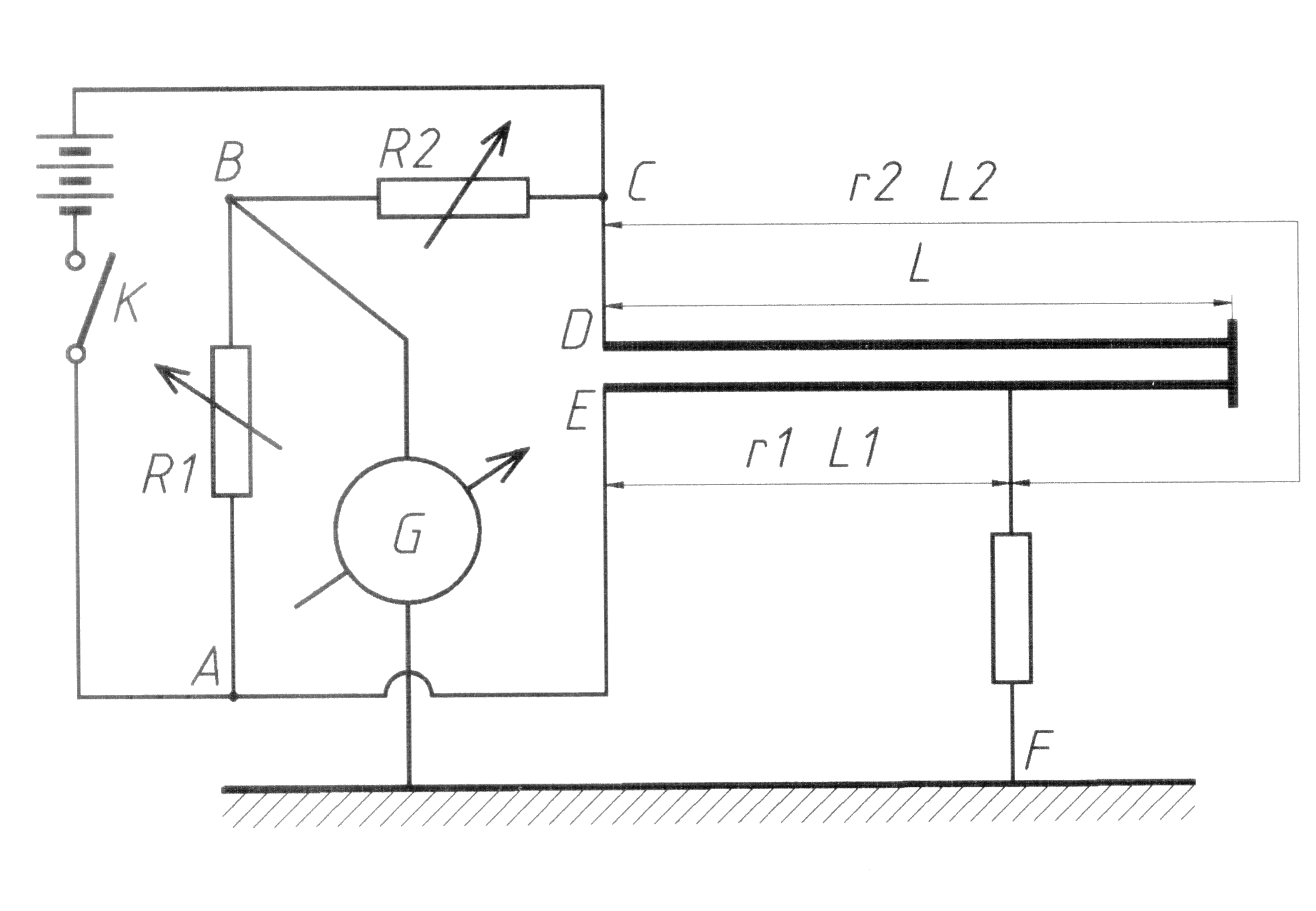 Murray-híd elvi kapcsolása